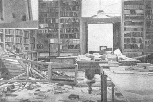 Poškodovani samostan v Stični